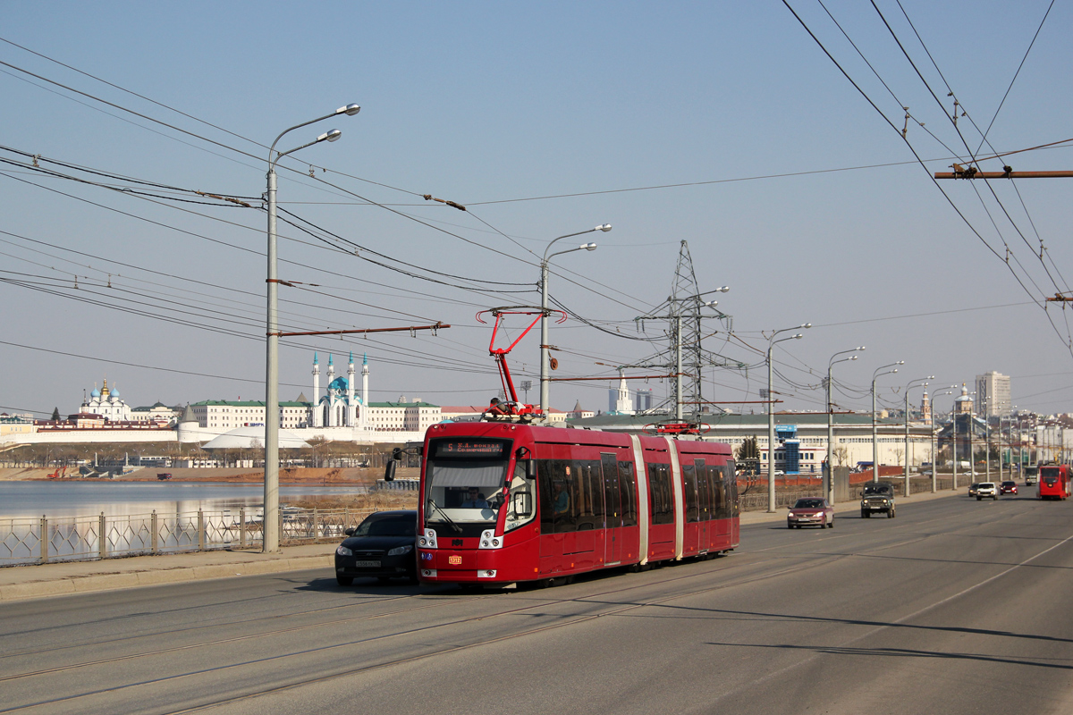 АКСМ-843 на фоне Казанского Кремля